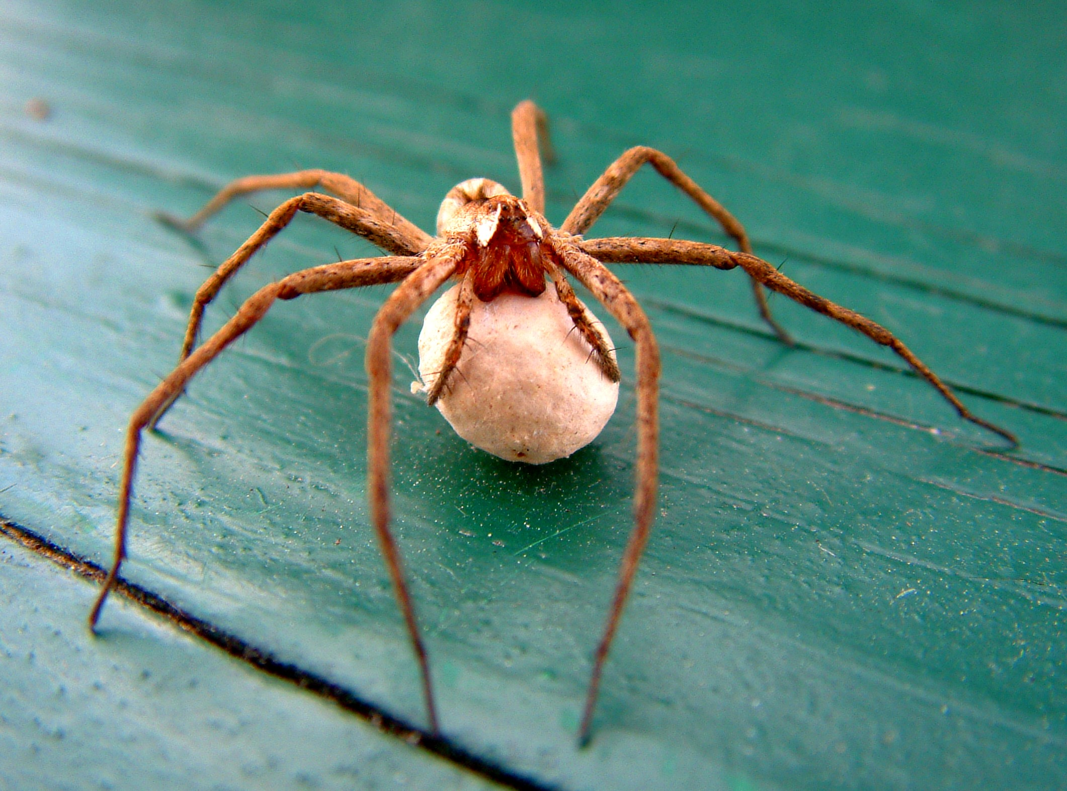 "Listspinne mit Brautgeschenk"